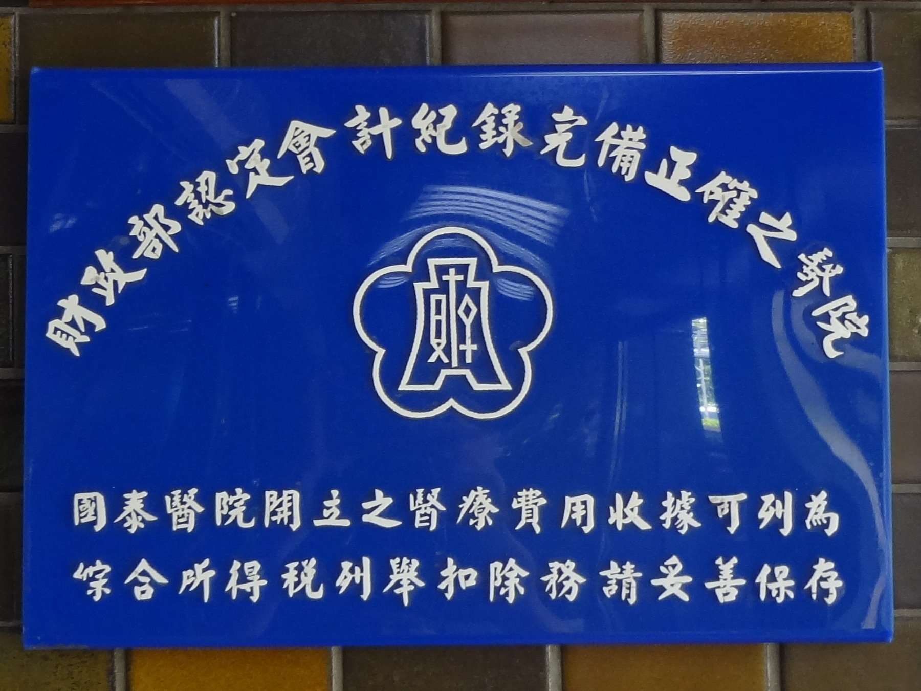 中華民國財政部頒給國泰綜合醫院的「財政部認定會計紀錄完備正確之醫院」塑膠牌，位於國泰綜合醫院總院本館大門右側外牆。